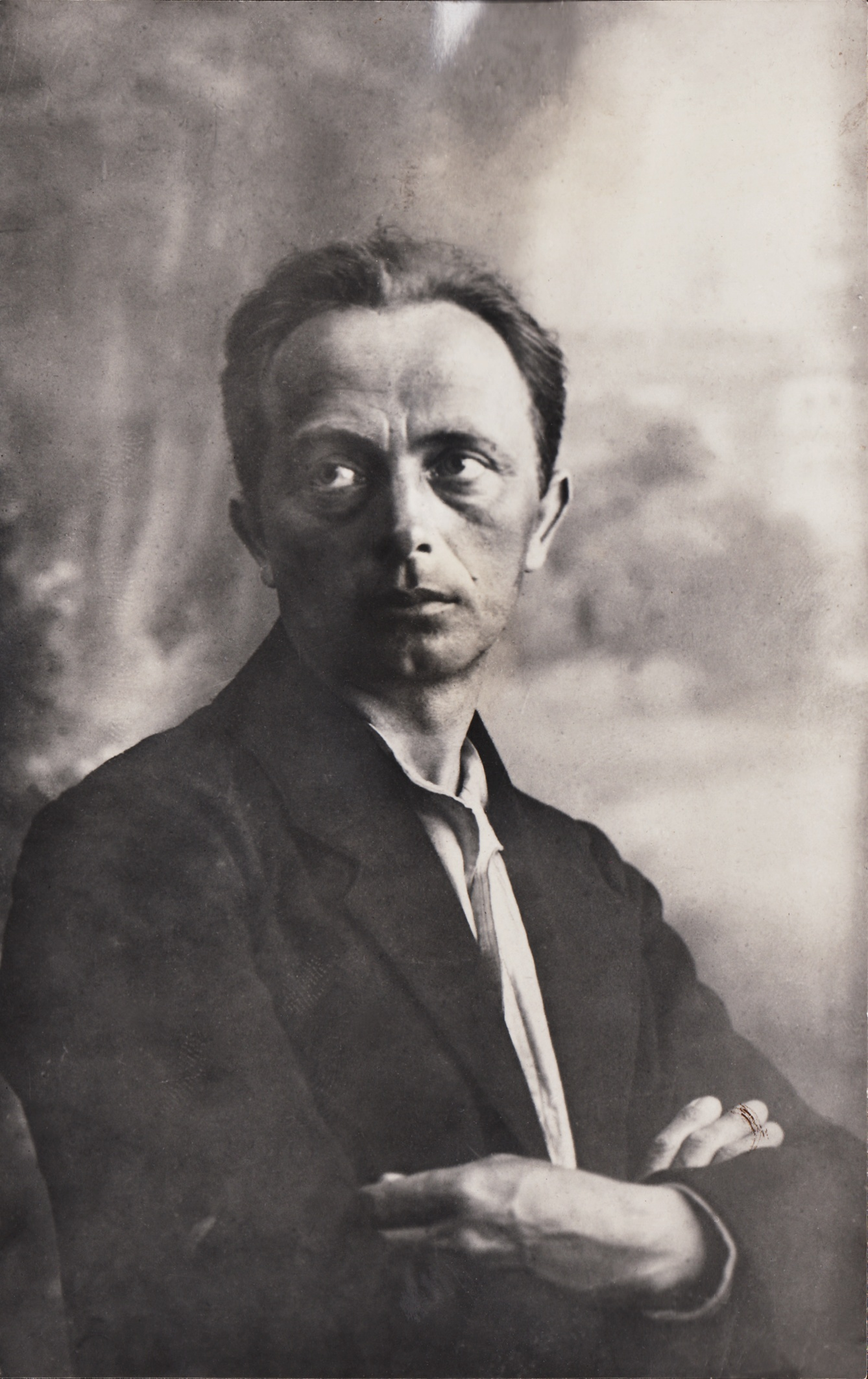 František Němec (1882-1918) byl český sochař.